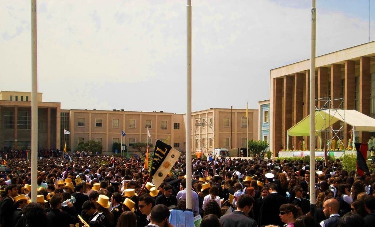 Benção das Fitas, Lisboa 2011